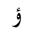 Der arabische Buchstabe Waw mit Hamza darüber.